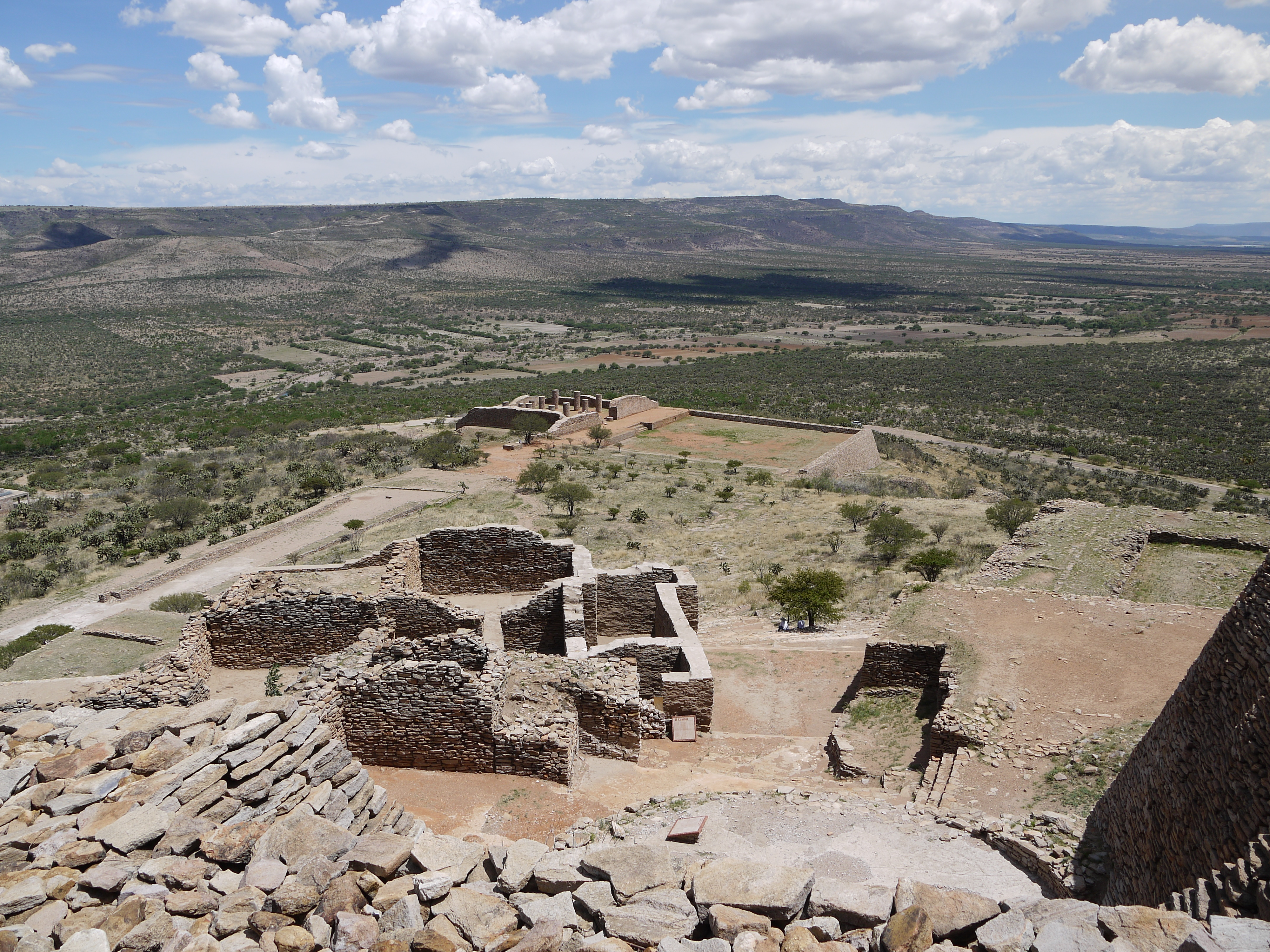 Ruinas, La Quemada